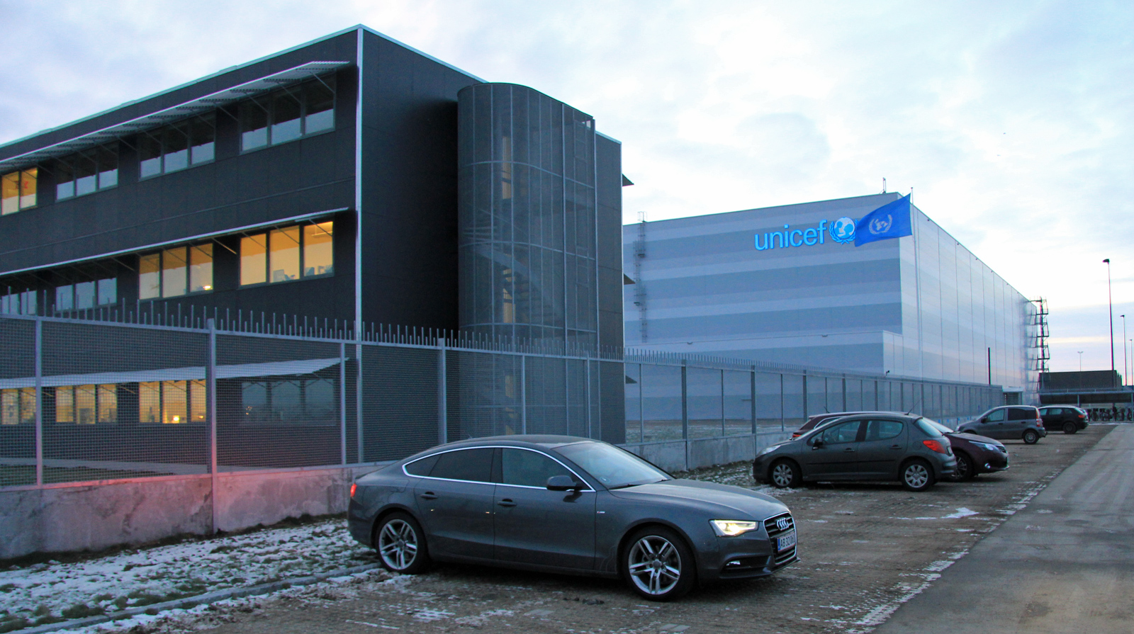 UNICEF's lagerbygninger i Nordhavnen, København